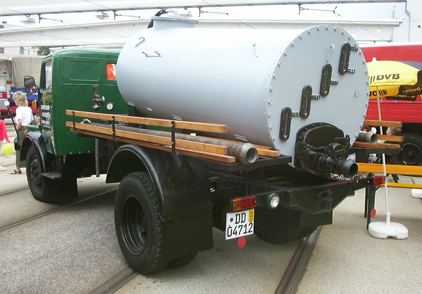 IFA S4000-1 für den Abwassertrabtransport